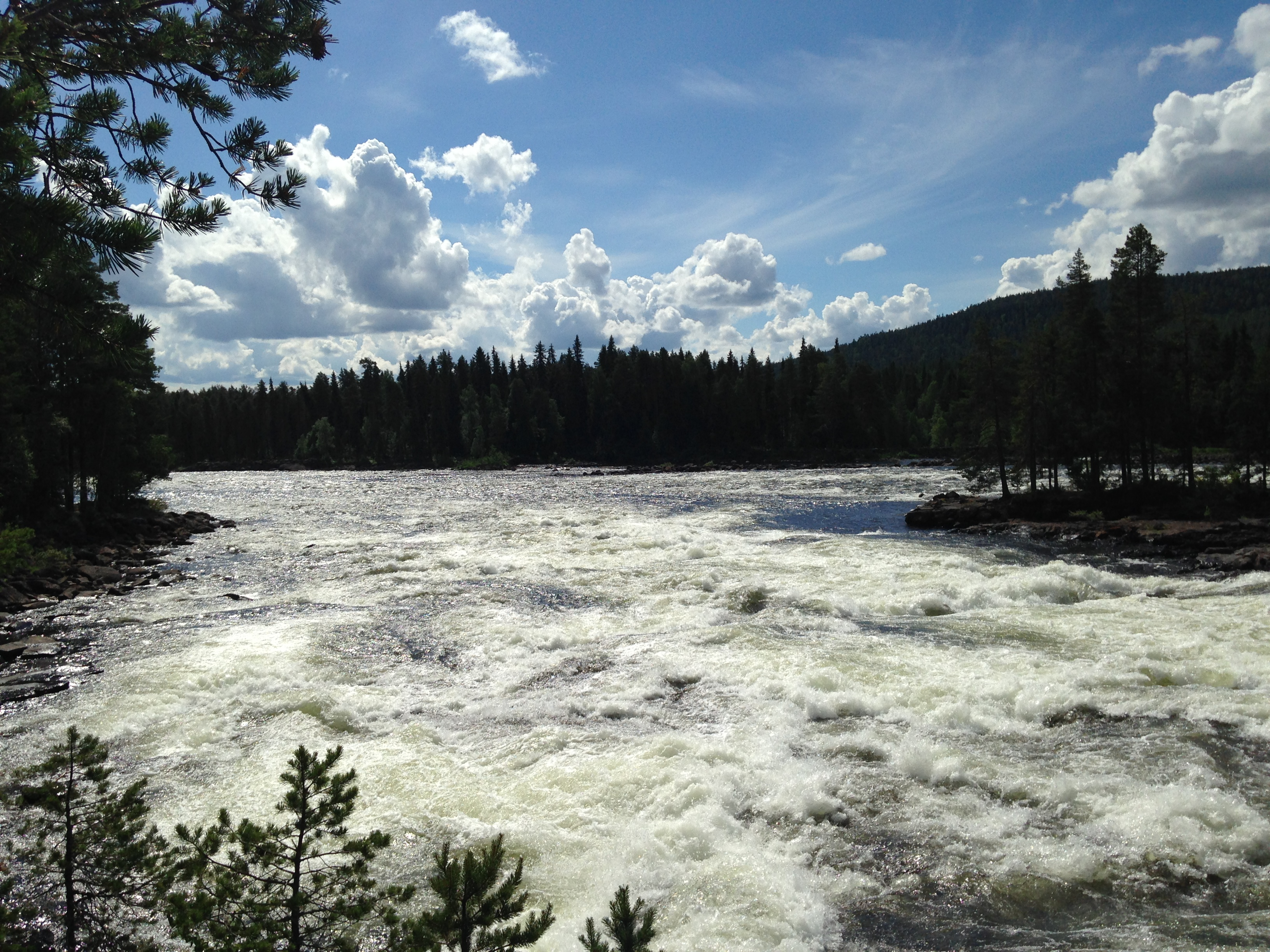 Forsen i juli 2014